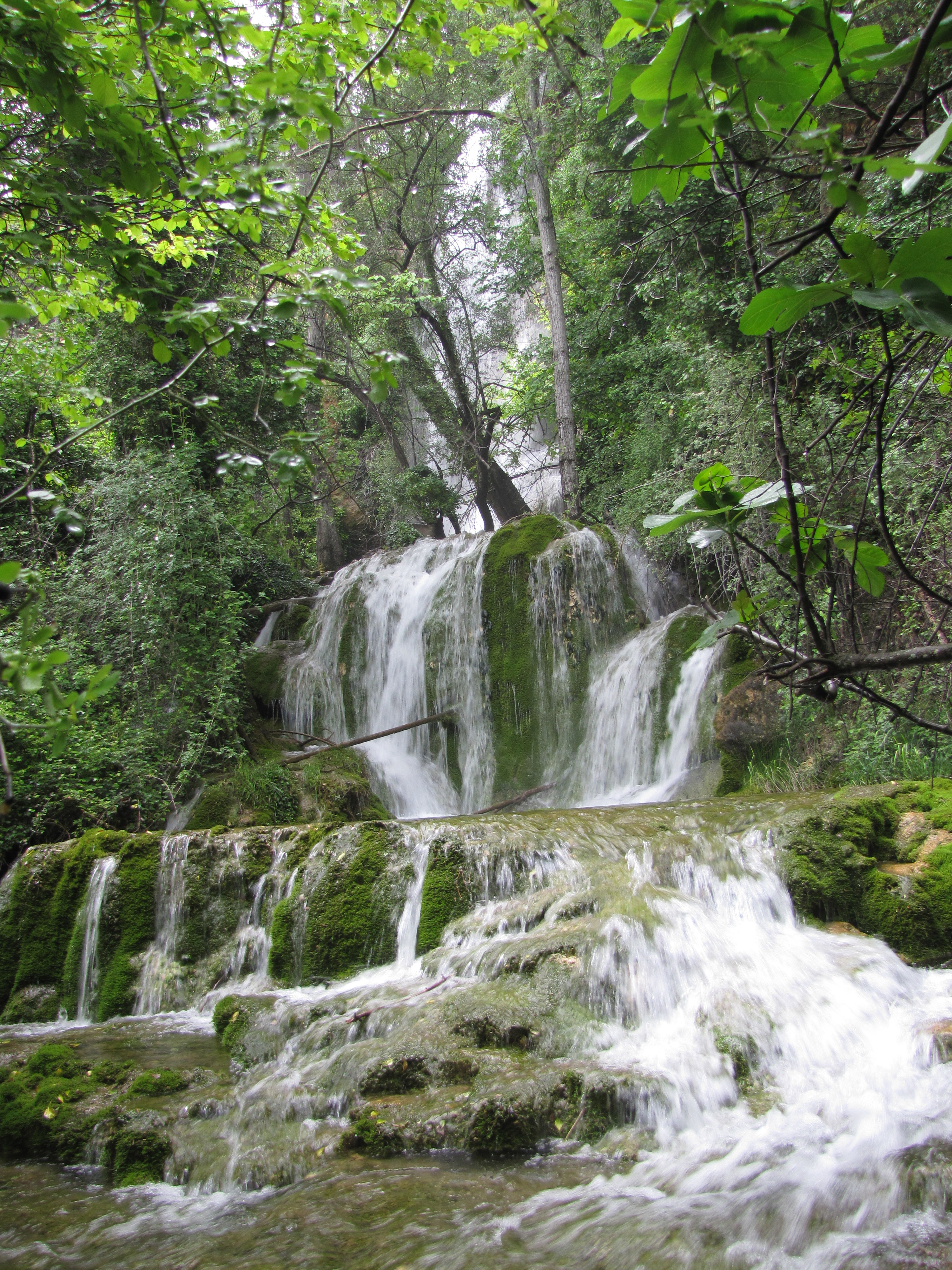 Cascada de La Toba (Fuentetoba).